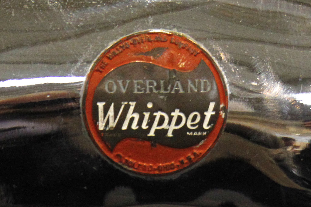 1928 Whippet Roadster 2.5 litre_IMG_3723